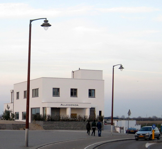 streetview after restauration in 2017